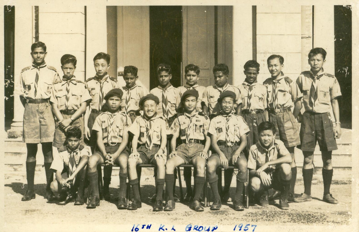 Pengakap Muda ke-16, 1957, Maxwell School